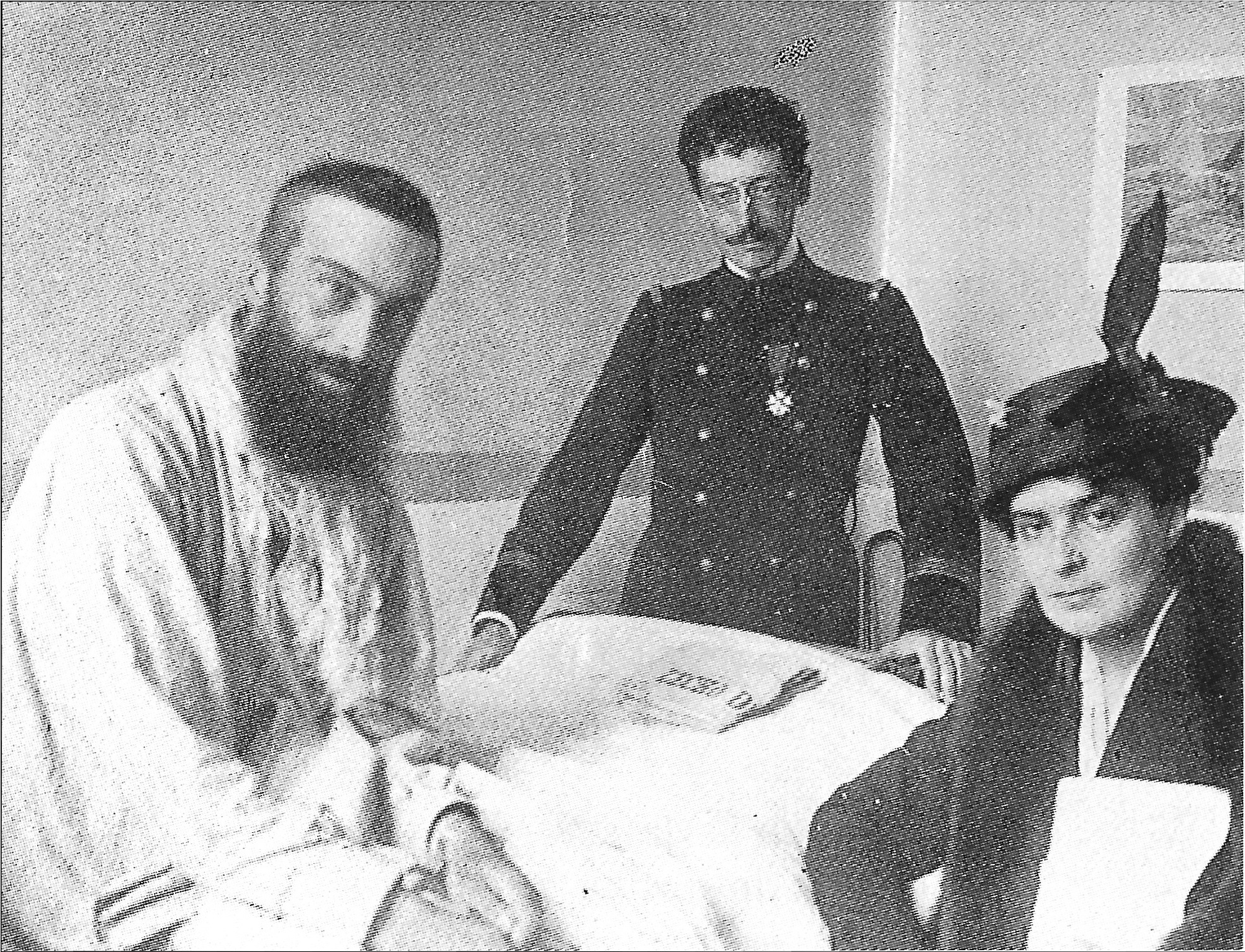 Segalen rendant visite à Gilbert de Voisins hospitalisé et réformé à Belfort en 1916. À droite, Louise de Hérédia, ex-épouse de Pierre Louÿs, devenue Mme Gilbert de Voisins.